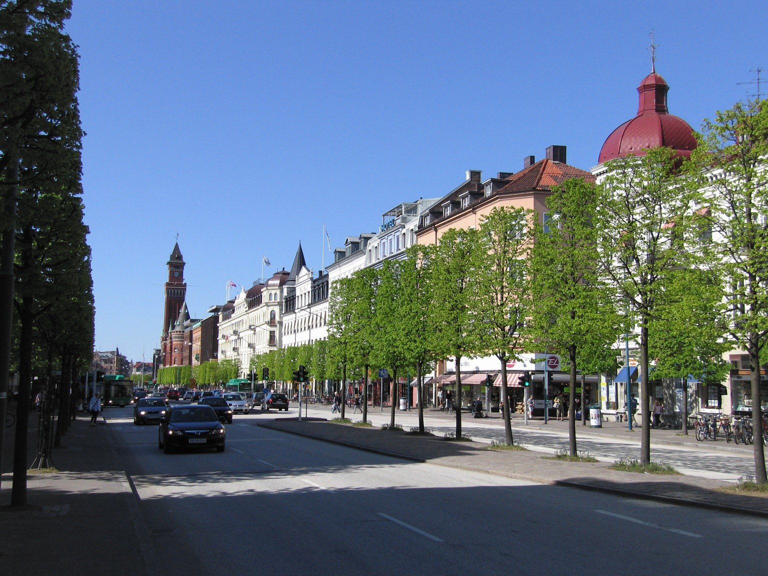 Järnvägsgatan, Helsingborg, Sweden.